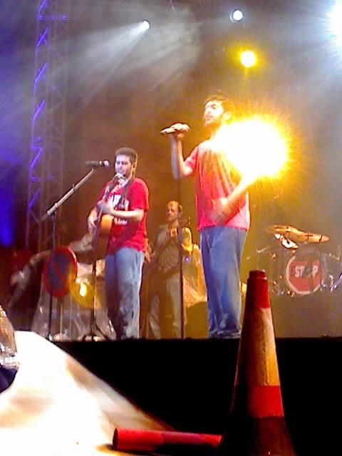 Foto del concert d'Estopa a Roses, Girona (Espanya)